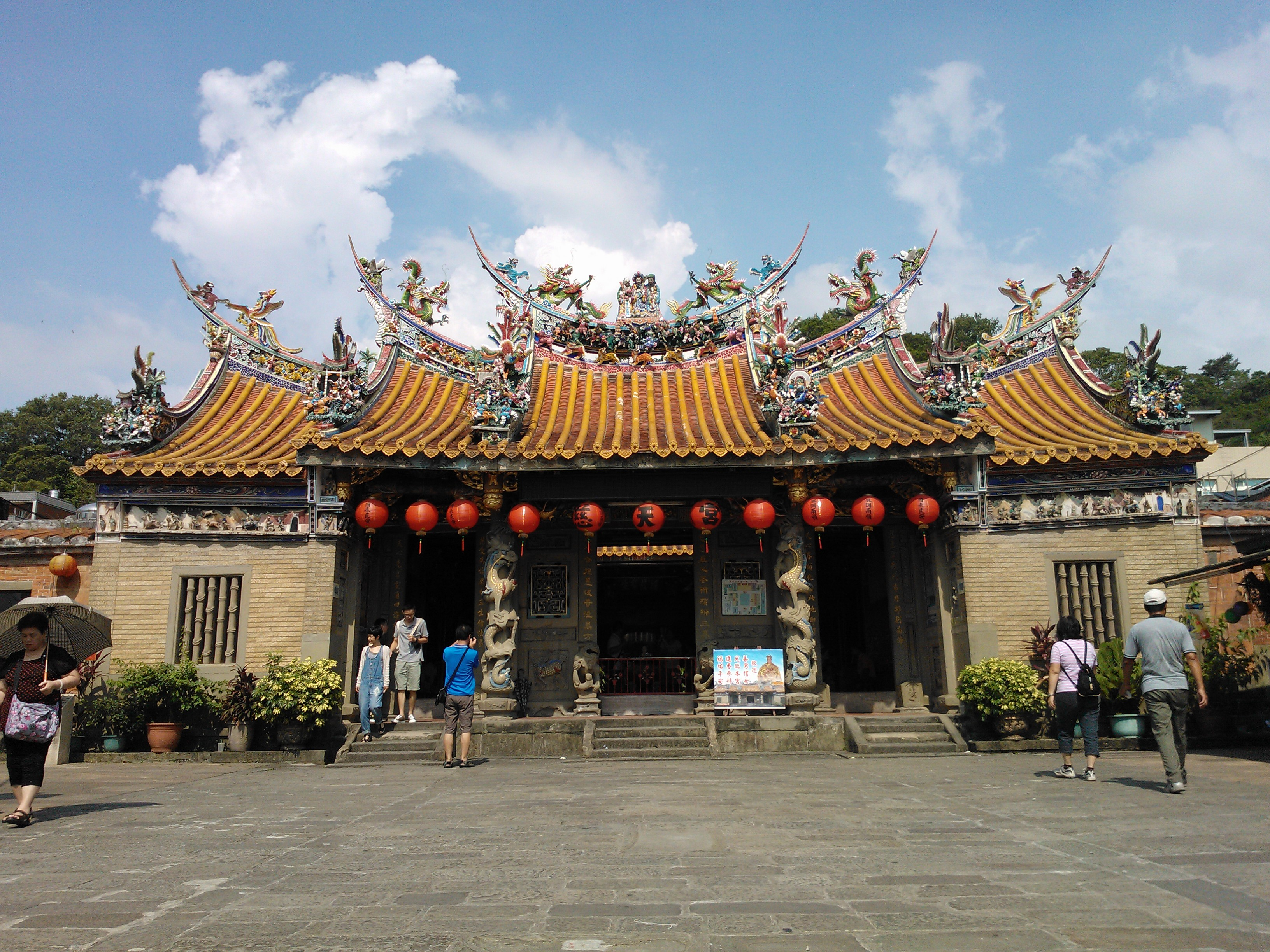 北埔慈天宮